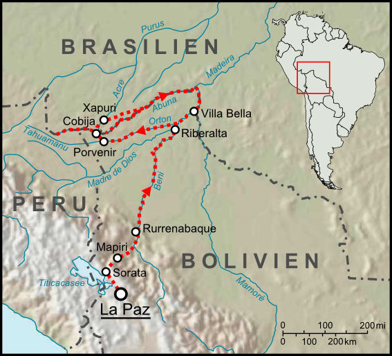 Route und Stationen der ersten Forschungsreise des Percy Fawcett